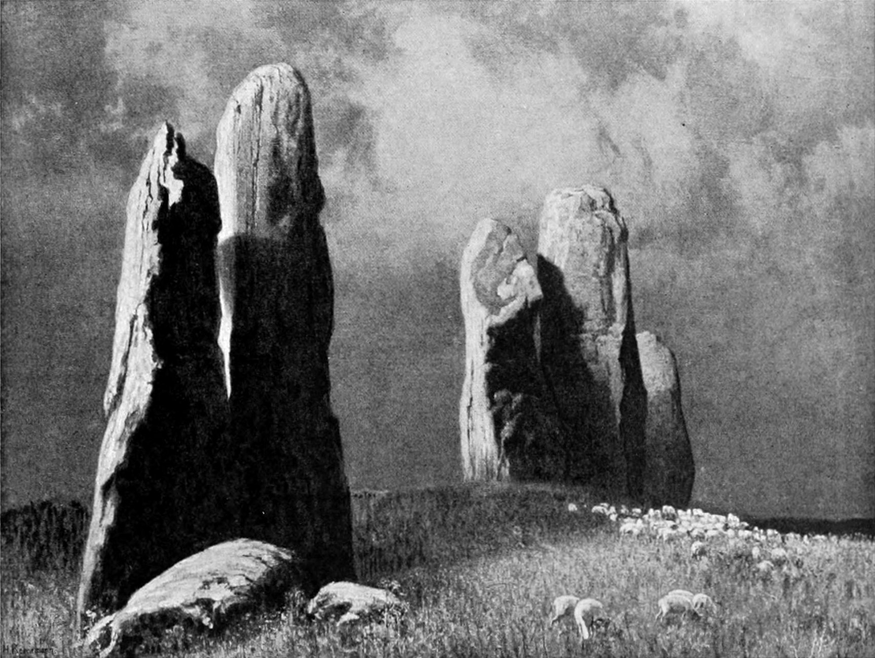 Carnac